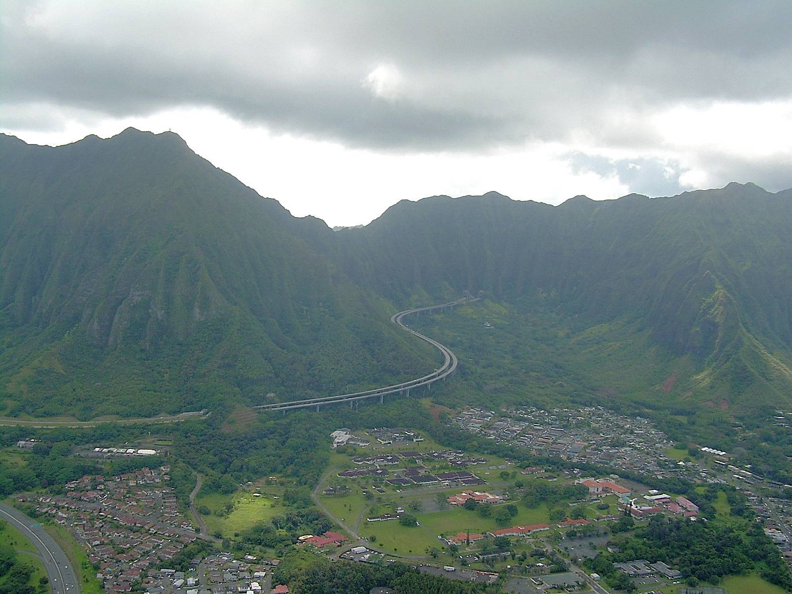 Ko'olau Range on Oahu, featuring Tetsuo Harano Tunnels on H-3.